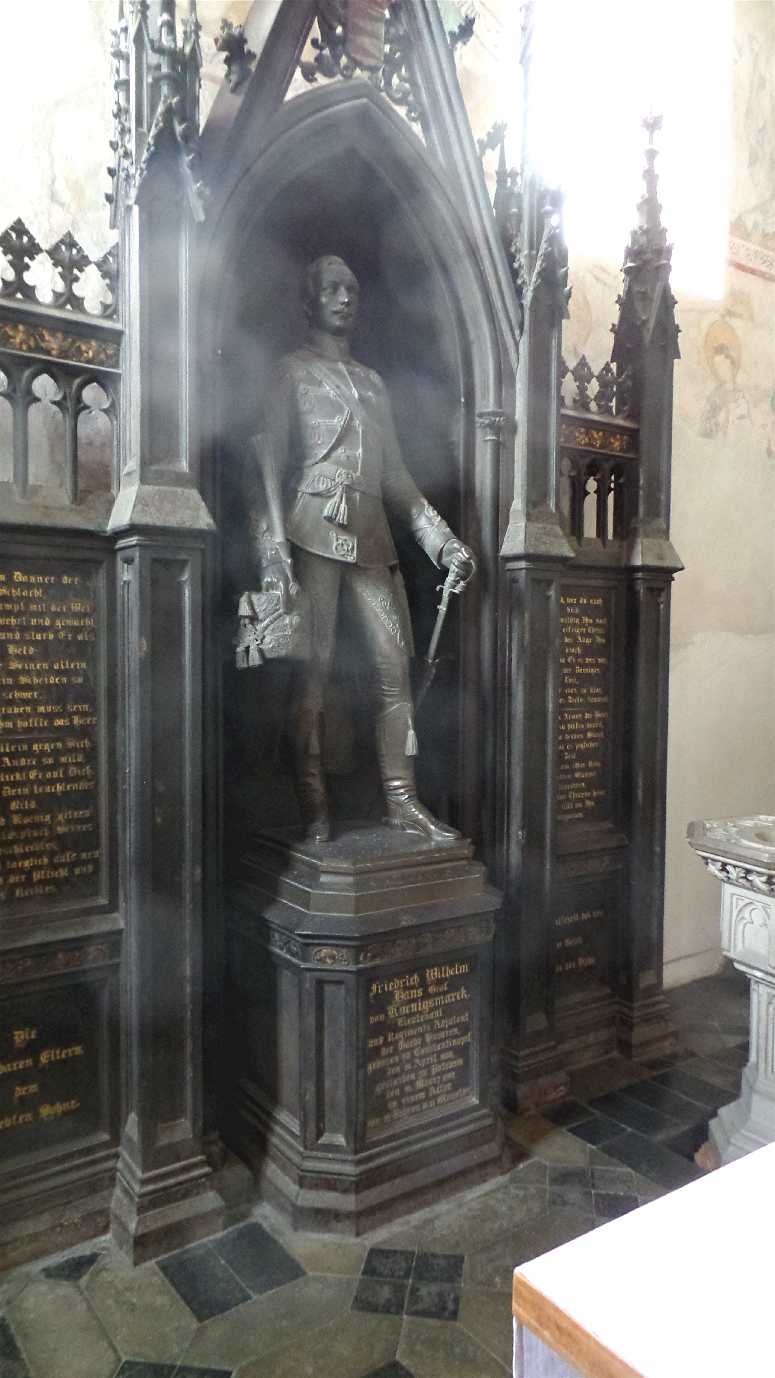 Bronzedenkmal in Kirche Plaue (Brandenburg)